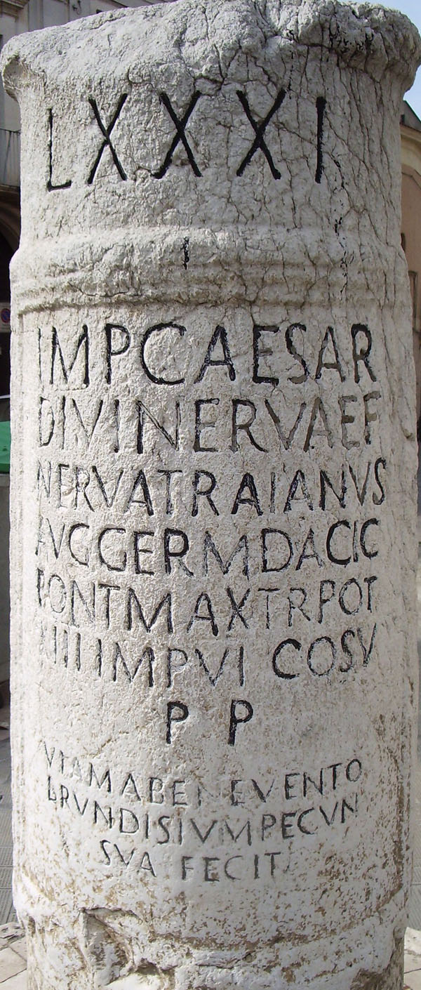 Particolare dell'iscrizione sulla colonna miliare della Via Traiana - località Cerignola (FG).